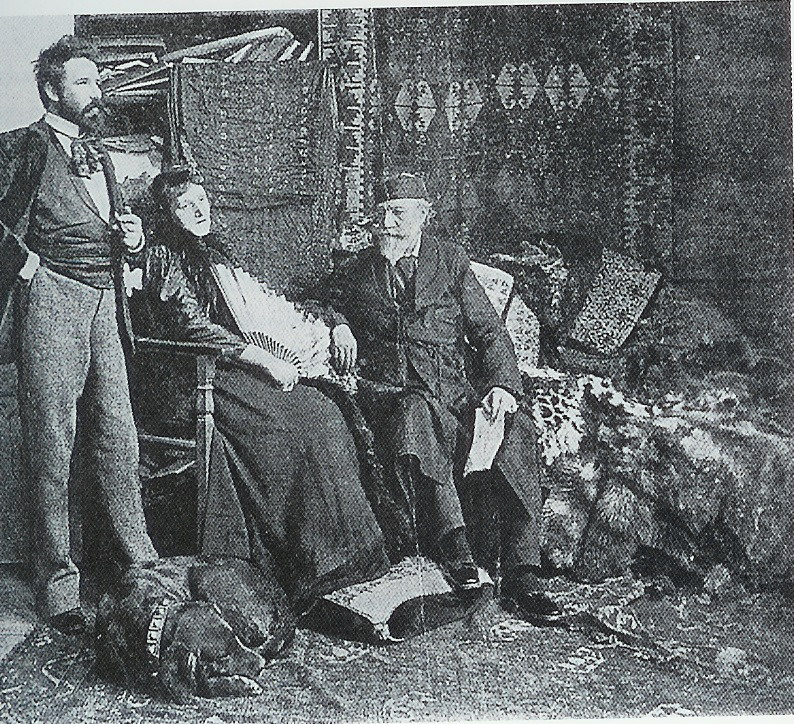 Balról Feszty Árpád áll. Mellette felesége, és apósa, Jókai Mór.